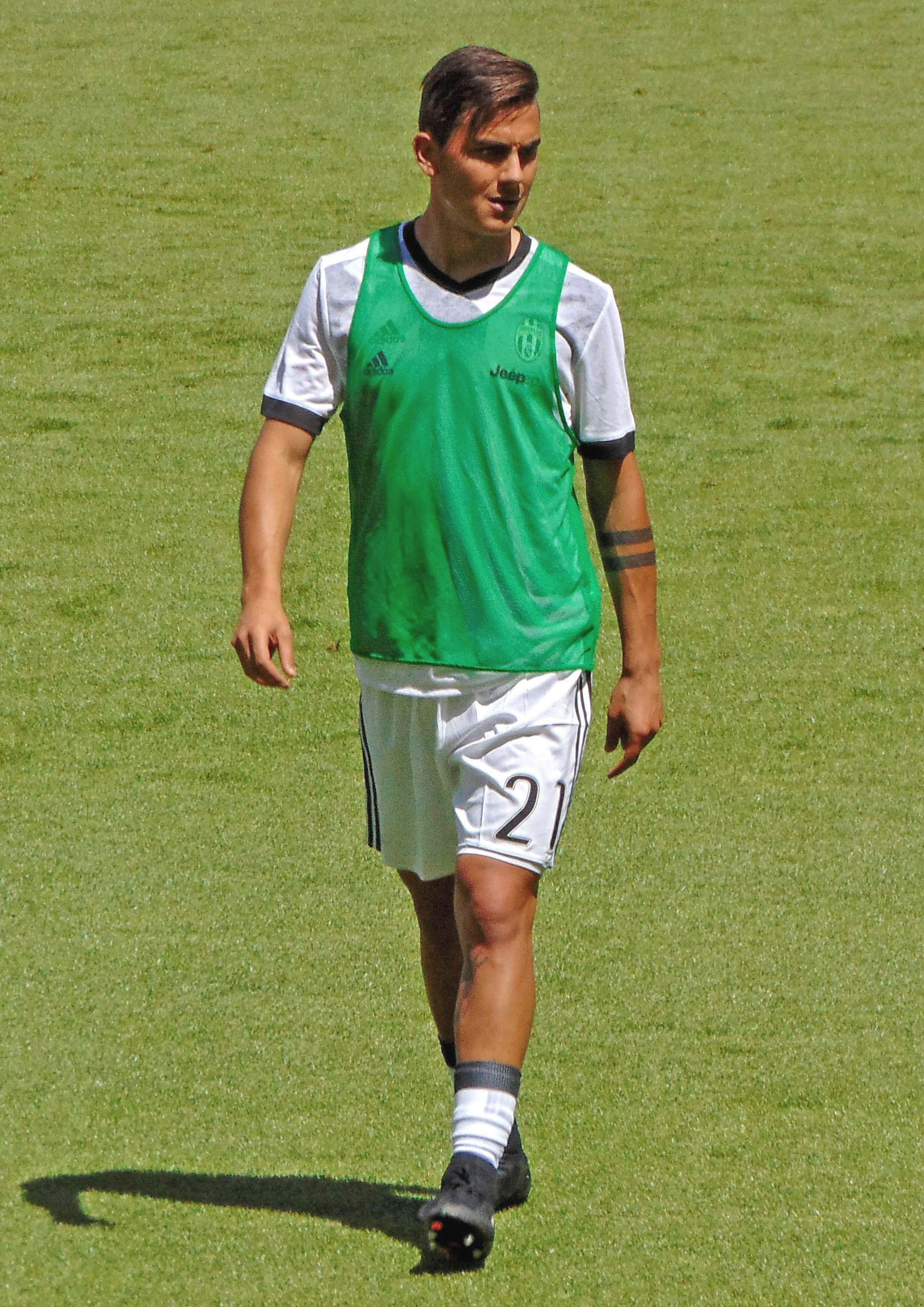 Torino, Juventus Stadium, 21 maggio 2017. Il calciatore della Juventus, Paulo Dybala, in riscaldamento prima della vittoriosa sfida interna contro il Crotone (3-0) valevole per la 37ª giornata del campionato italiano di Serie A 2016-17.